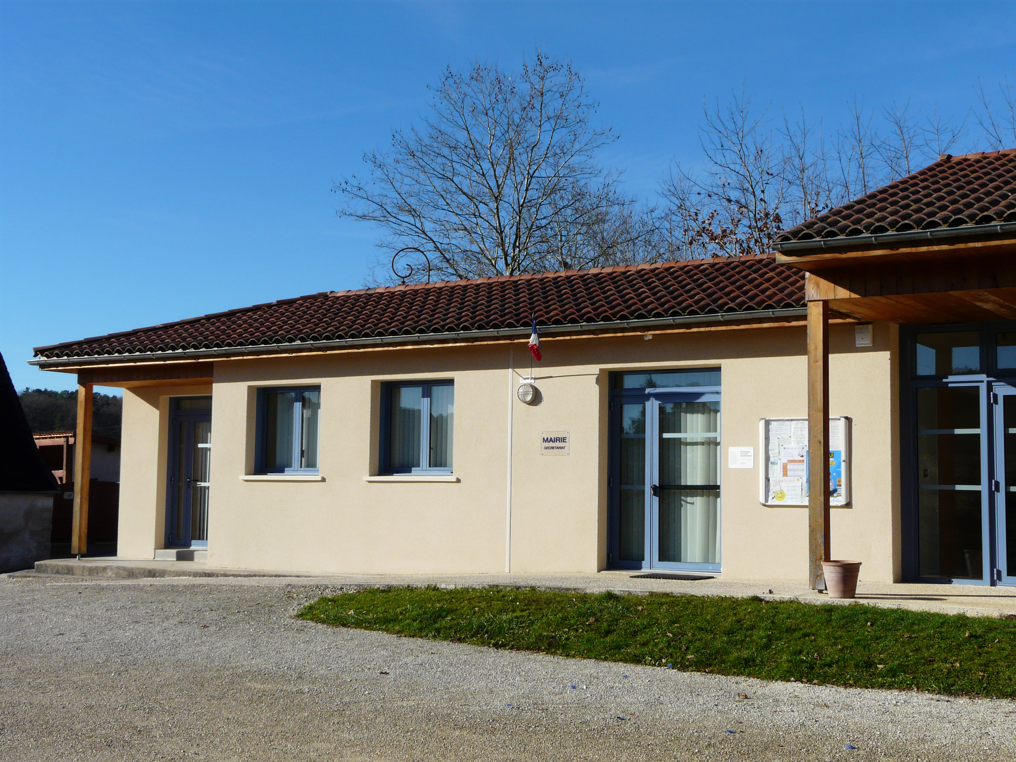 La mairie de Saint-Antoine-d'Auberoche, Dordogne, France.